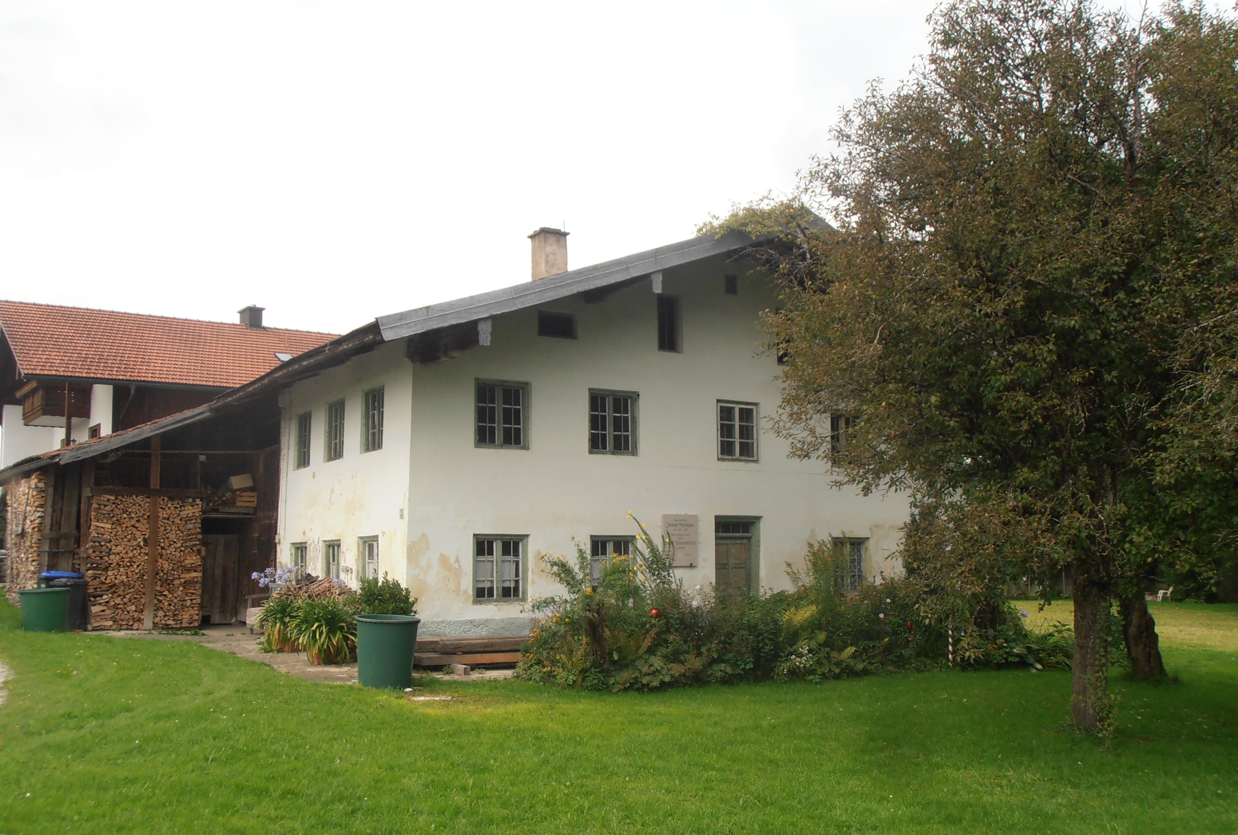 OLYMPUS DIGITAL CAMERA Gemeinde Surberg, Ortsteil Hufschlag, Papst-Benedikt XVI.-Weg 19